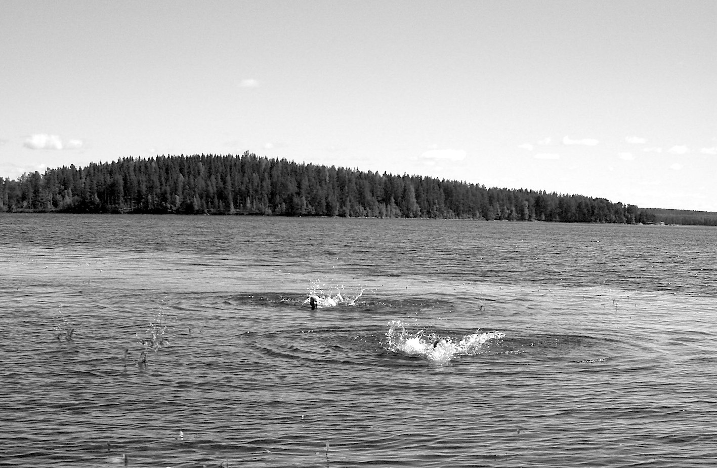 Aurejärvi ja Riihisaari